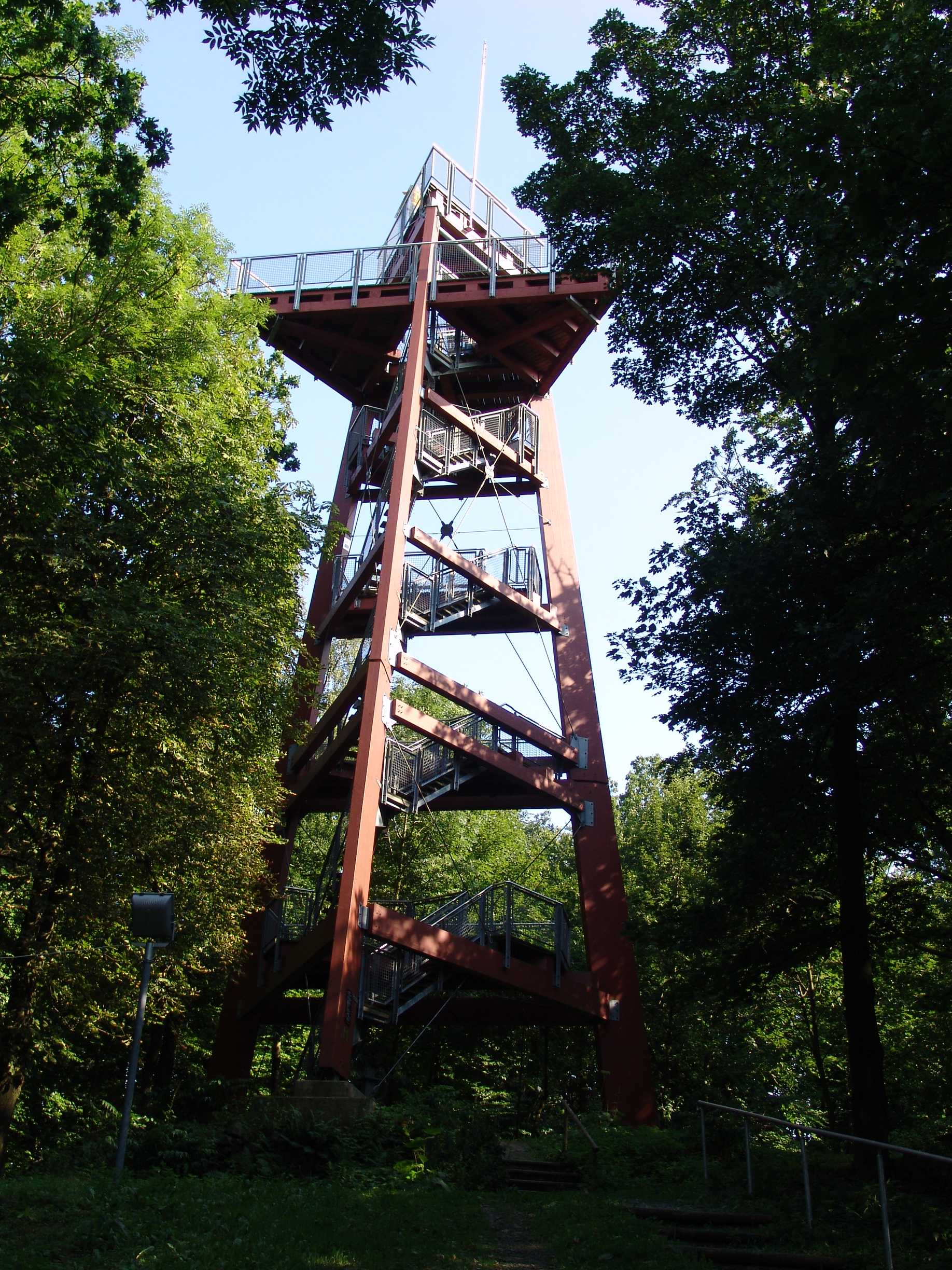 Aussichtsturm auf dem Schlechteberg in Ebersbach/Sa., Landkreis Görlitz, Sachsen